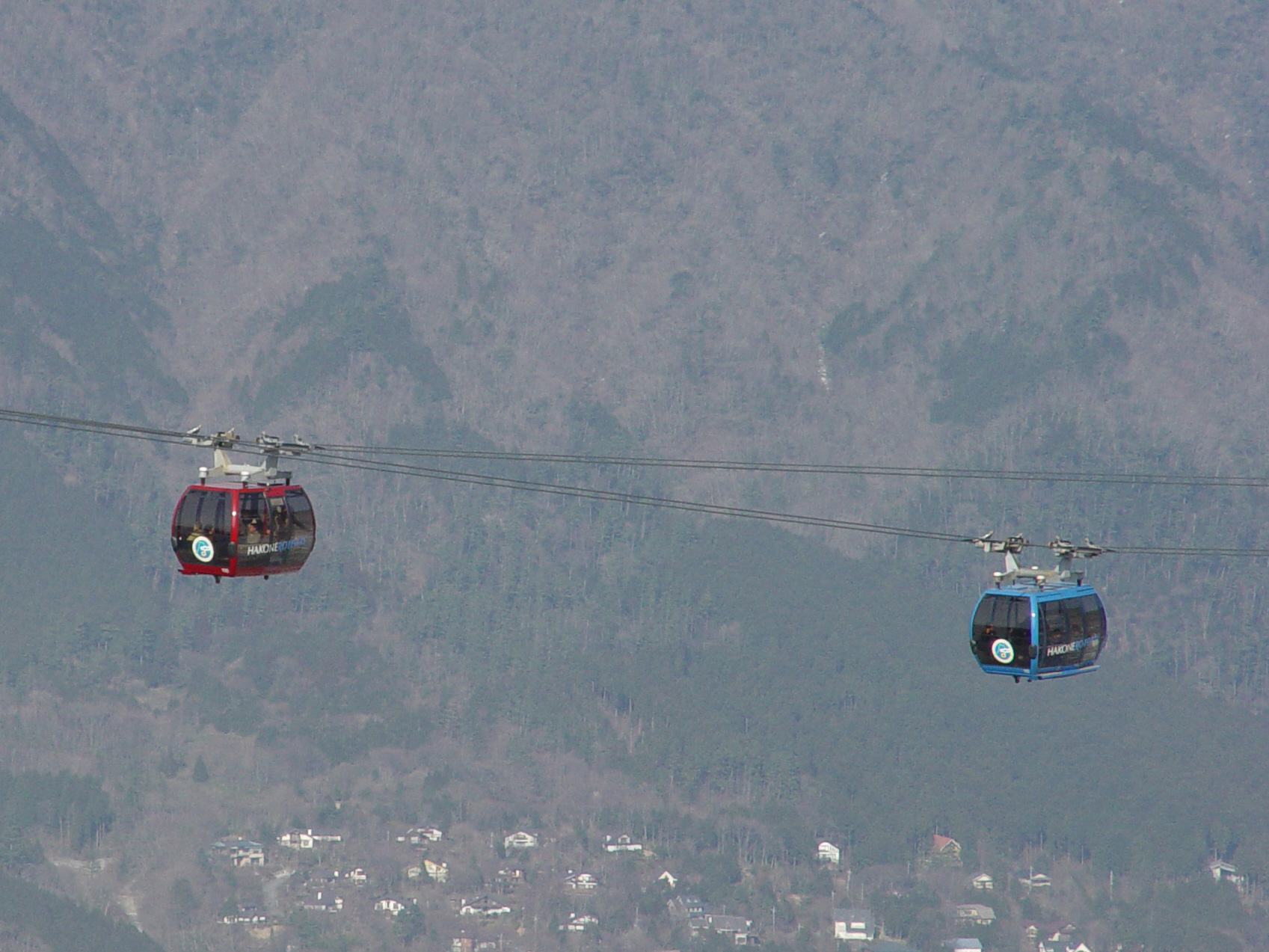 Hakone Ropeway, near Owakudani Staion 箱根ロープウェイ大涌谷駅近く